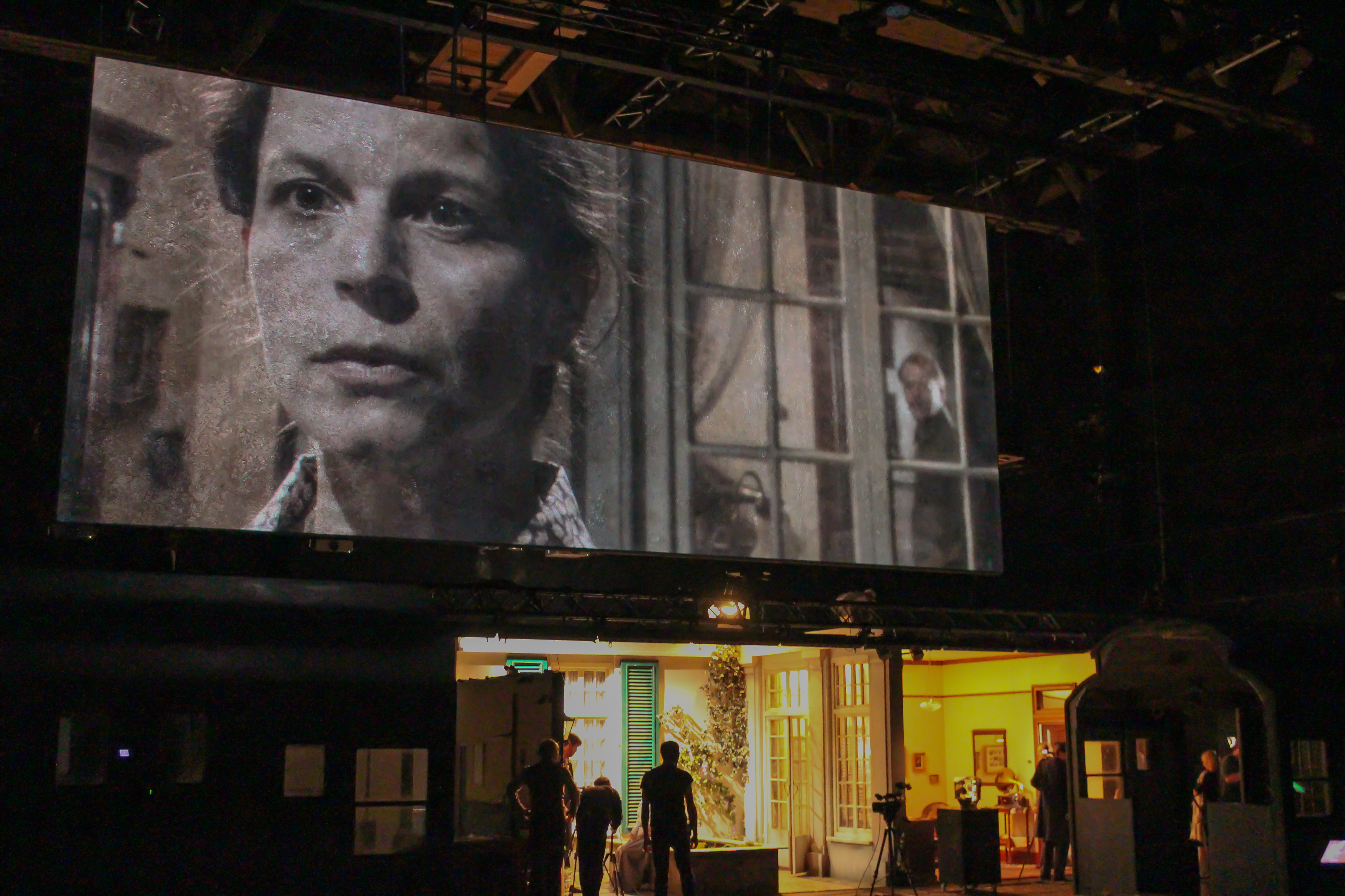 Ruth Marie Kröger, Felix Römer (auf der Leinwand)